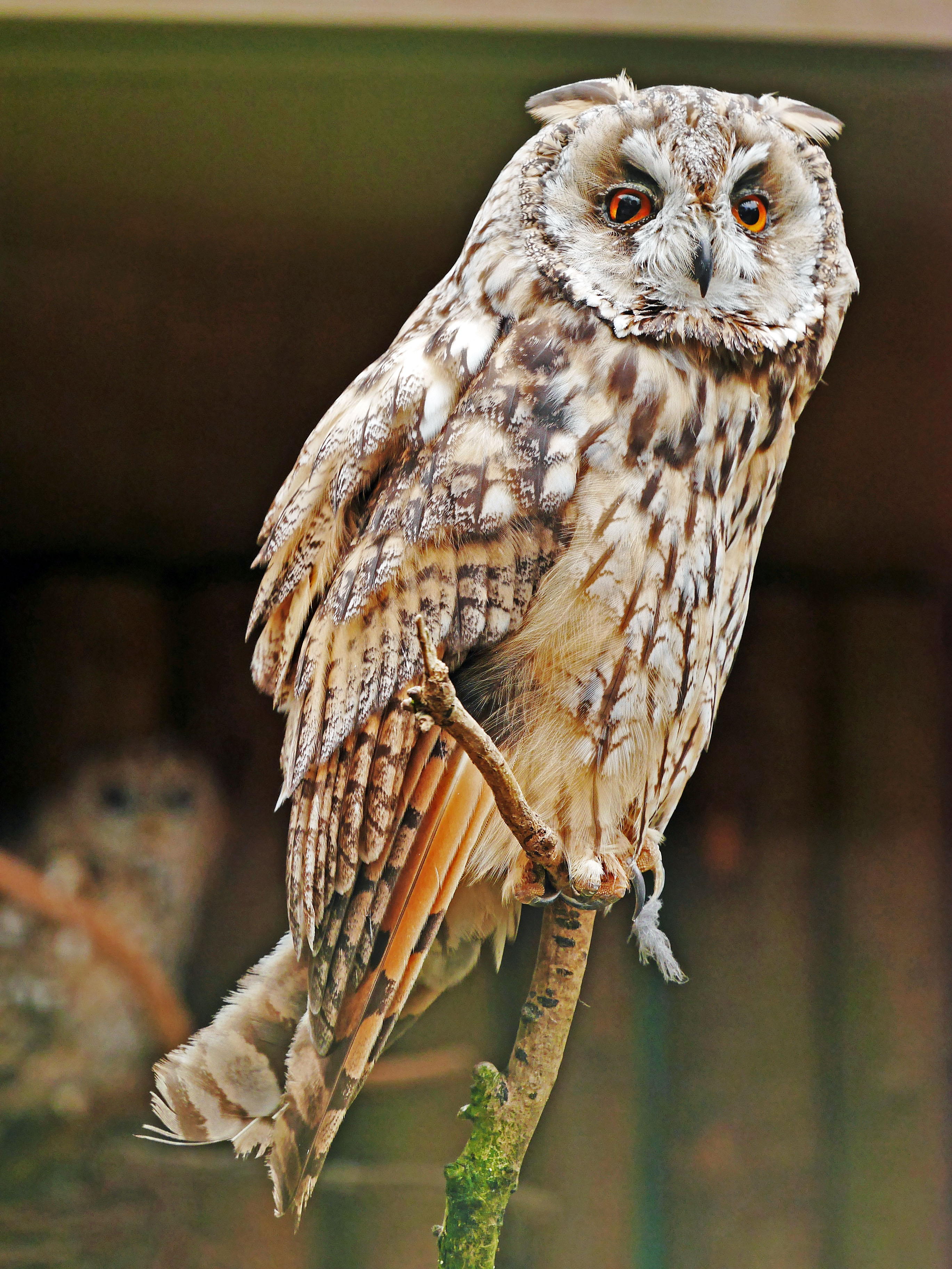 Waldohreule (Asio otus) im Wildpark Lüneburger Heide. Die Waldohreule ist eine Vogelart, die zu den Eigentlichen Eulen (Strigidae) gehört. Sie ist eine der häufigsten Eulen in Mitteleuropa.